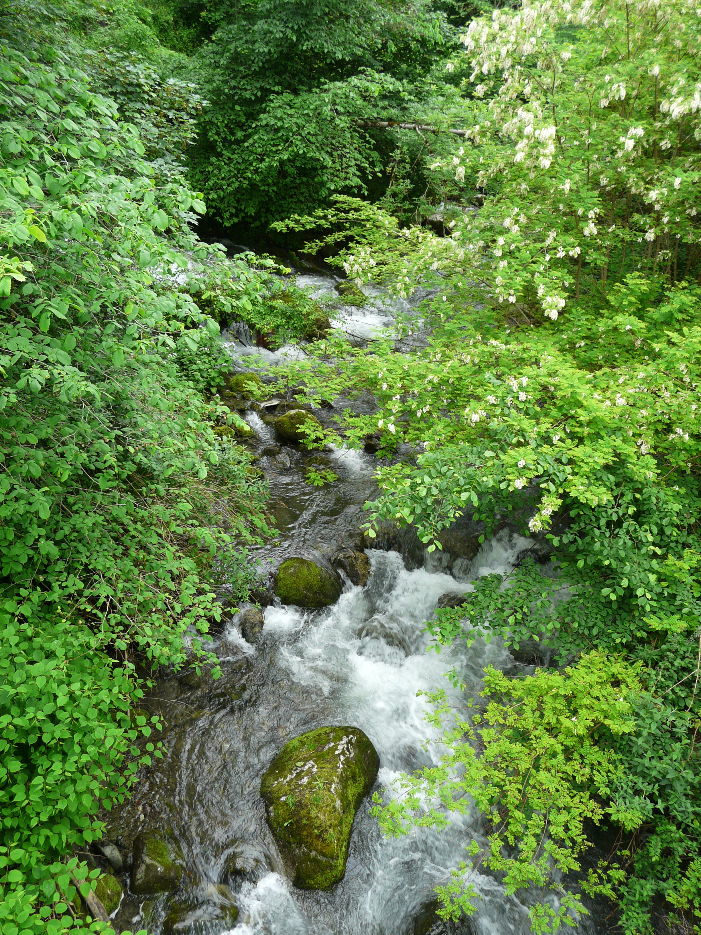 L'One, en amont du pont de Mousquères, sert de limite entre Bagnères-de-Luchon (à gauche) et Cazaril-Laspènes (à droite), Haute-Garonne, France.